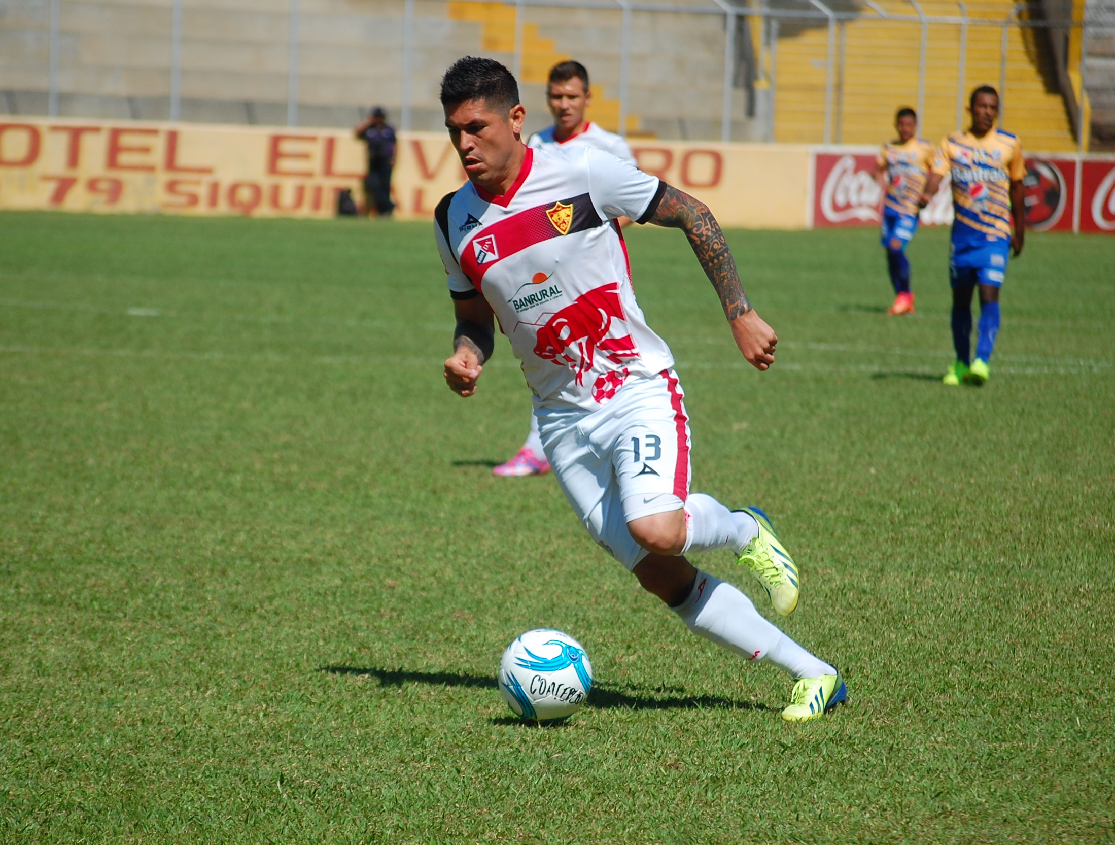 Paulo Centurión del Club Social y Deportivo Coatepeque controlando el balon en el partido enfrentado al Club Social y Deportivo Suchitepéquez